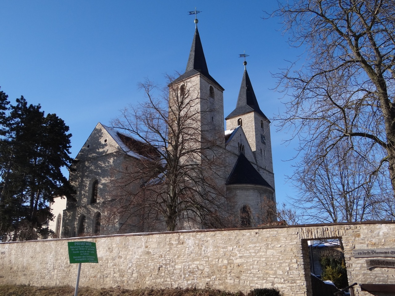 St. Lorenz von Südosten mit der Mauer des Klostergartens, März 2013.